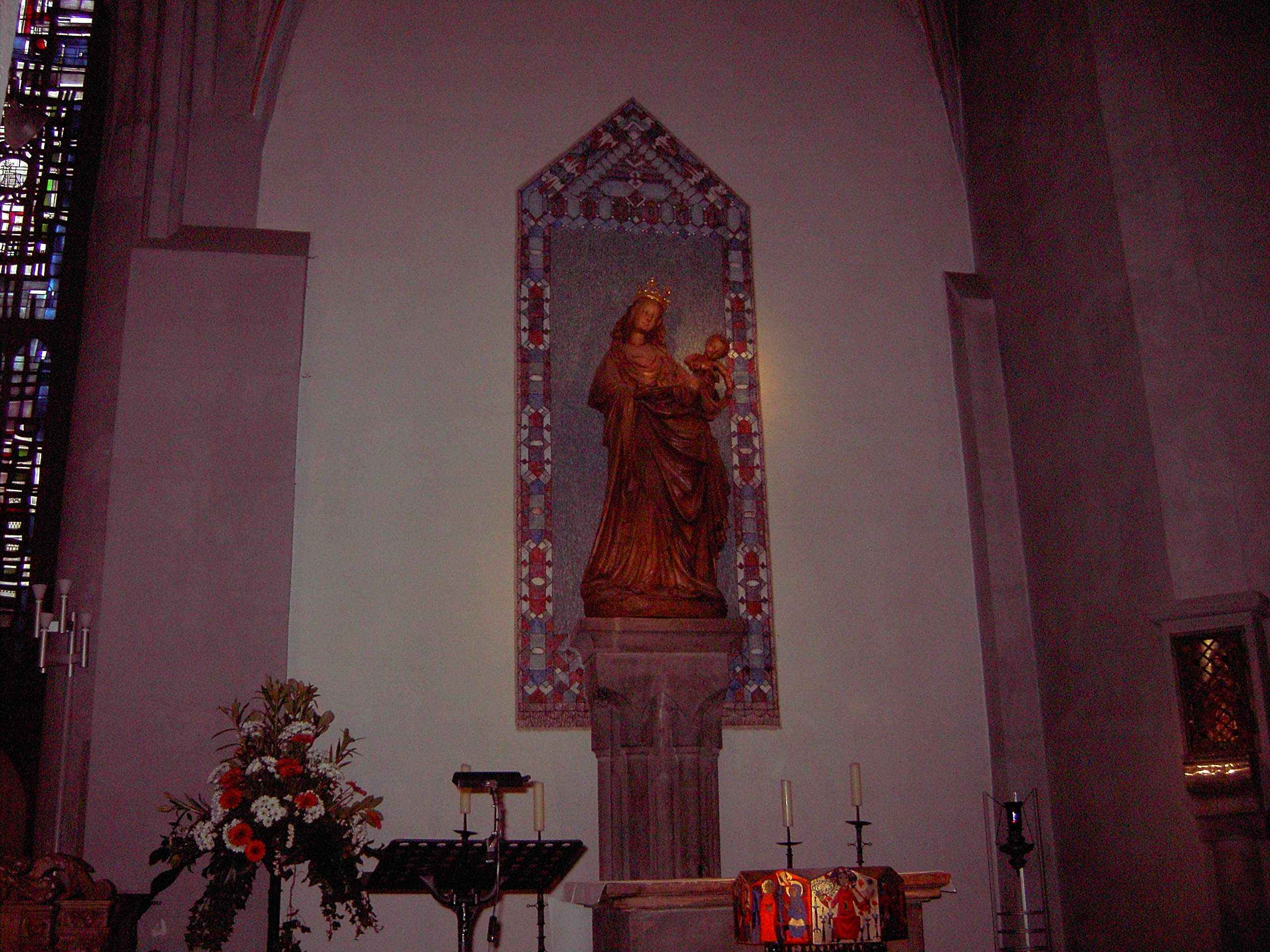 Schöne Madonna in St. Foillan